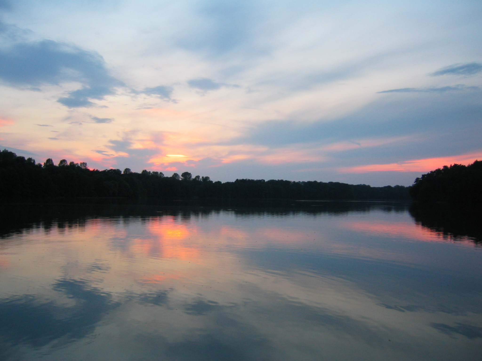 Der Schmale Luzin von der Badestelle in Carwitz aus fotografiert.